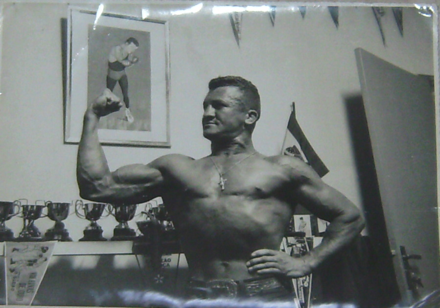 Manoel Severino. Ex lutador de boxe.